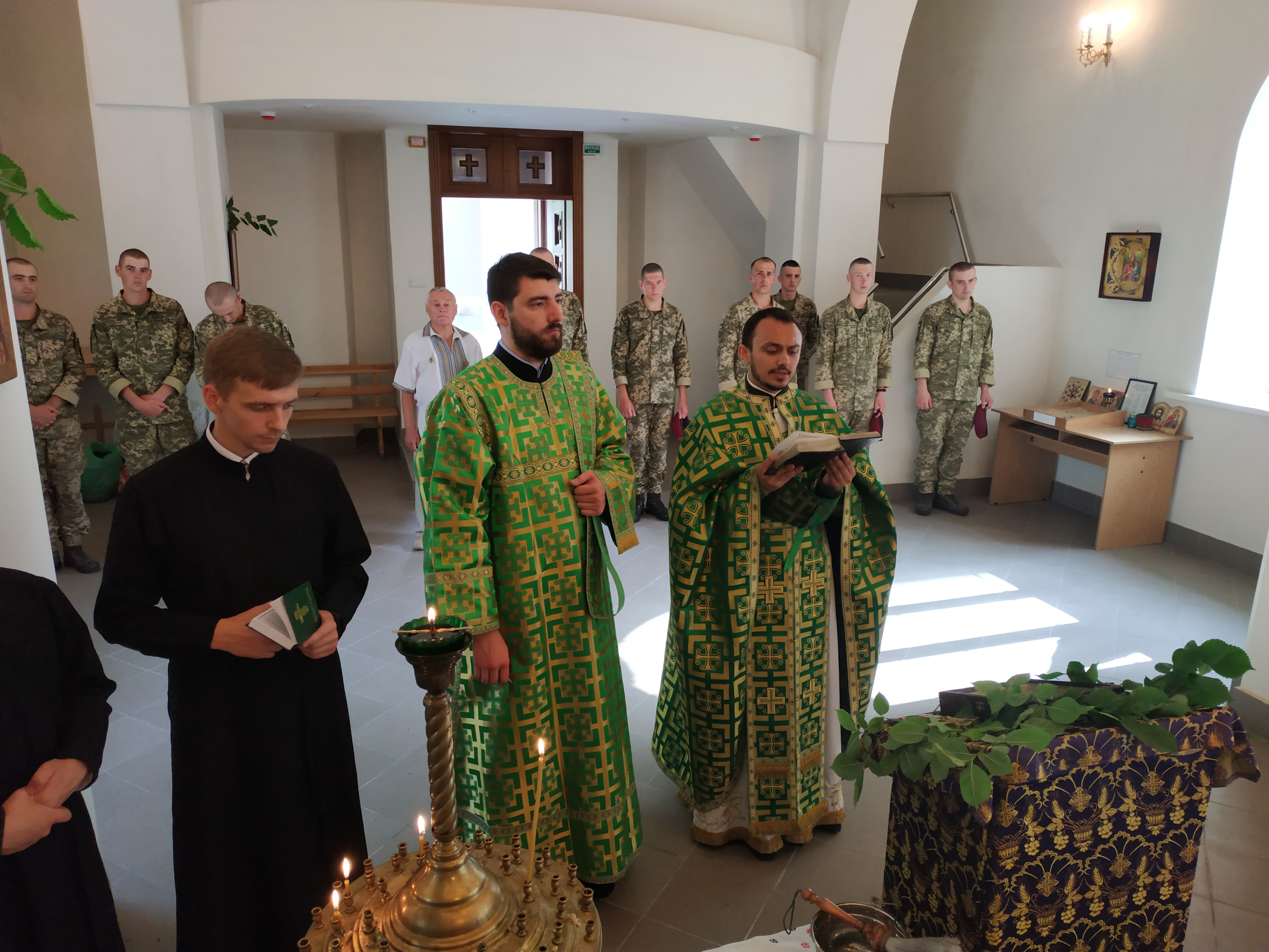 Київ 2019